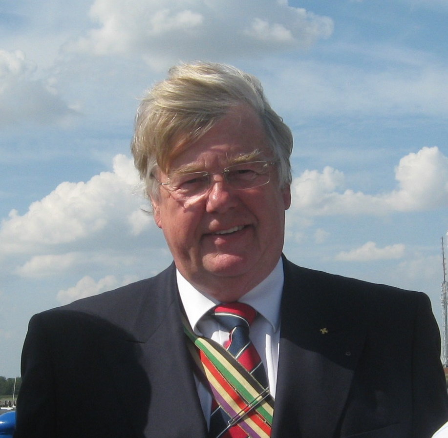 Porträtfotografie von Jörg Haasters